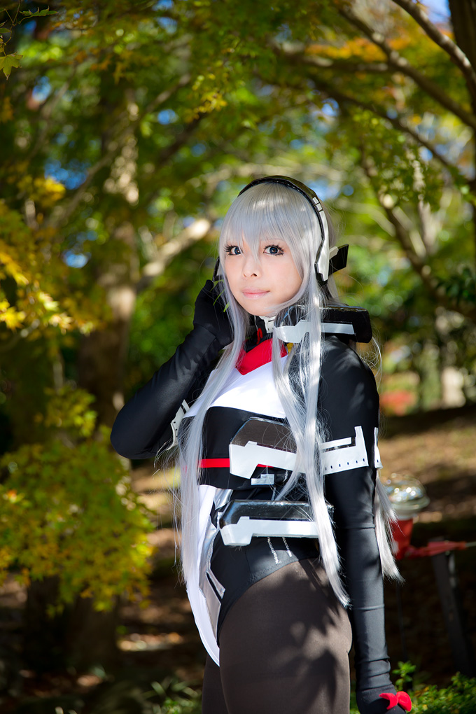 Cosplay de Horizon Ariadust personaje principal femenino de Kyōkai Senjō no Horizon en Japón.